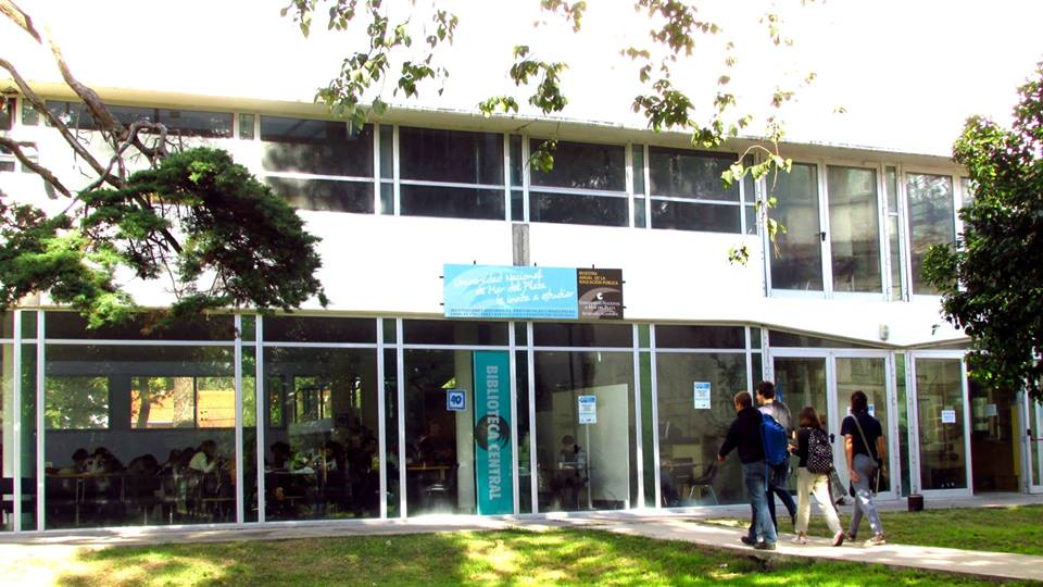 Biblioteca Central Universidad Nacional de Mar del Plata